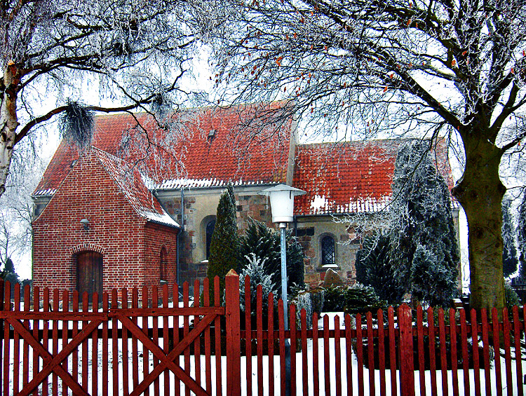 fra syd